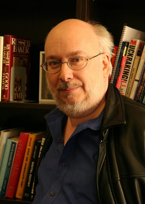 Retrato del académico estadounidense Henry Jenkins.